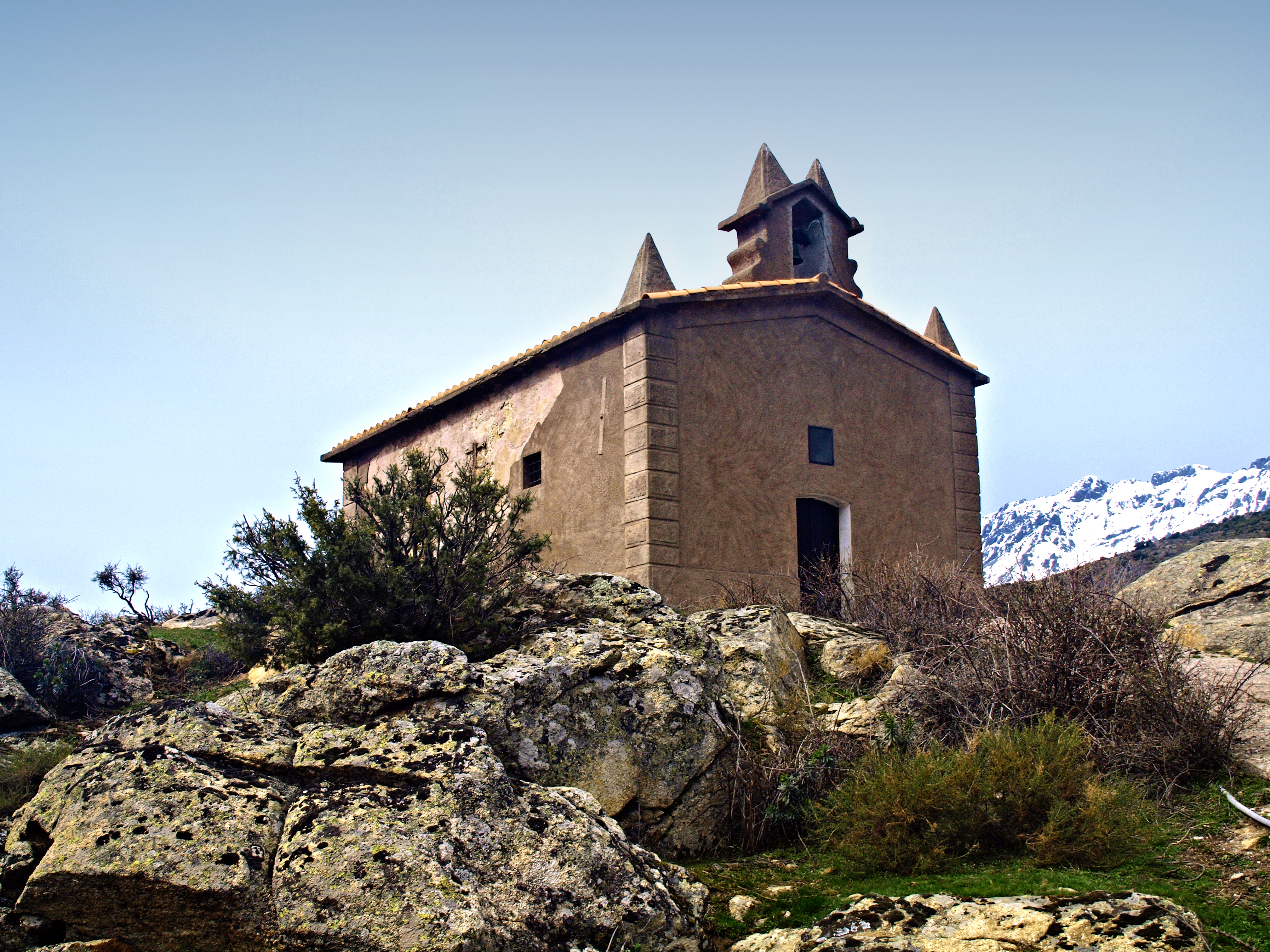 Corscia (Corsica) - Chapelle San Pancraziu